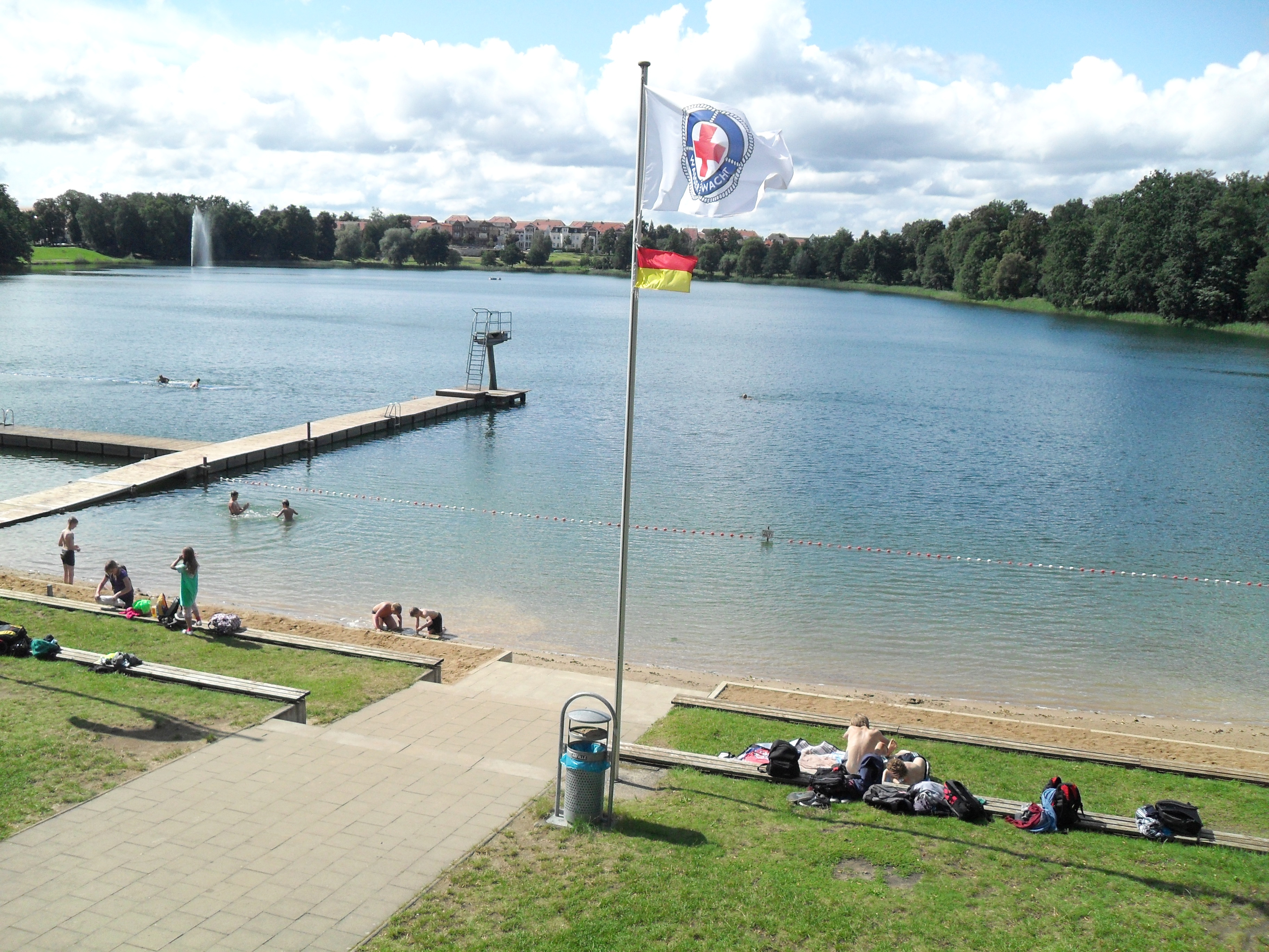 Neustrelitz, Badeanstalt am Glambecker See